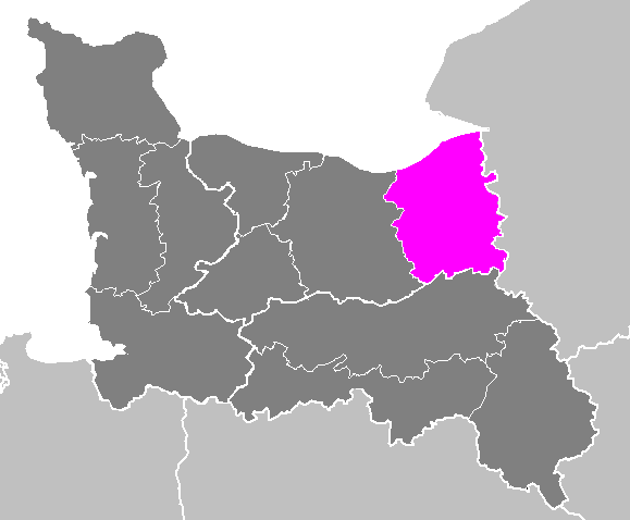 Maps of arrondissements and cantons of France: Arrondissement de Lisieux.PNG